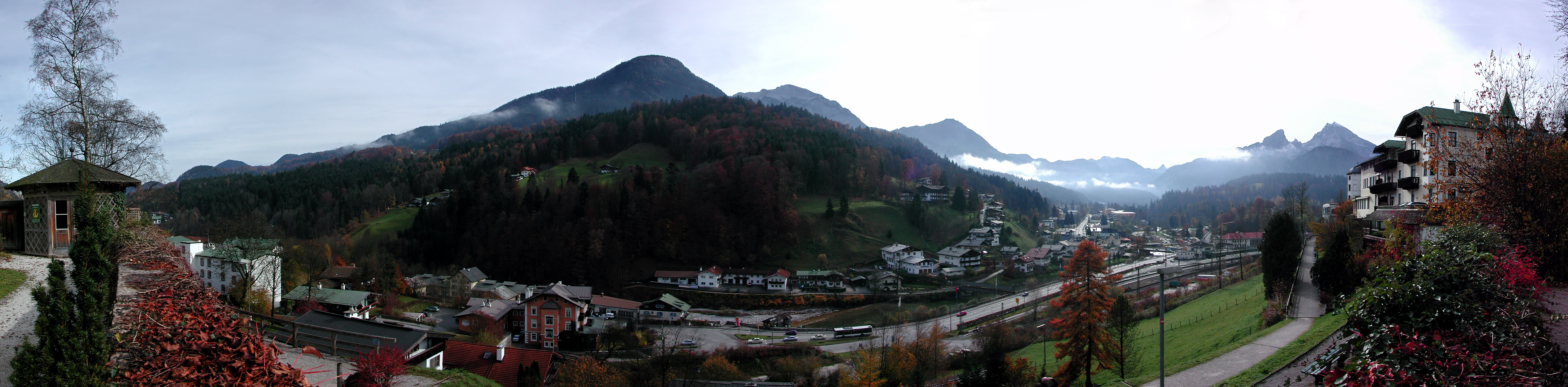 Blick über Berchtesgaden